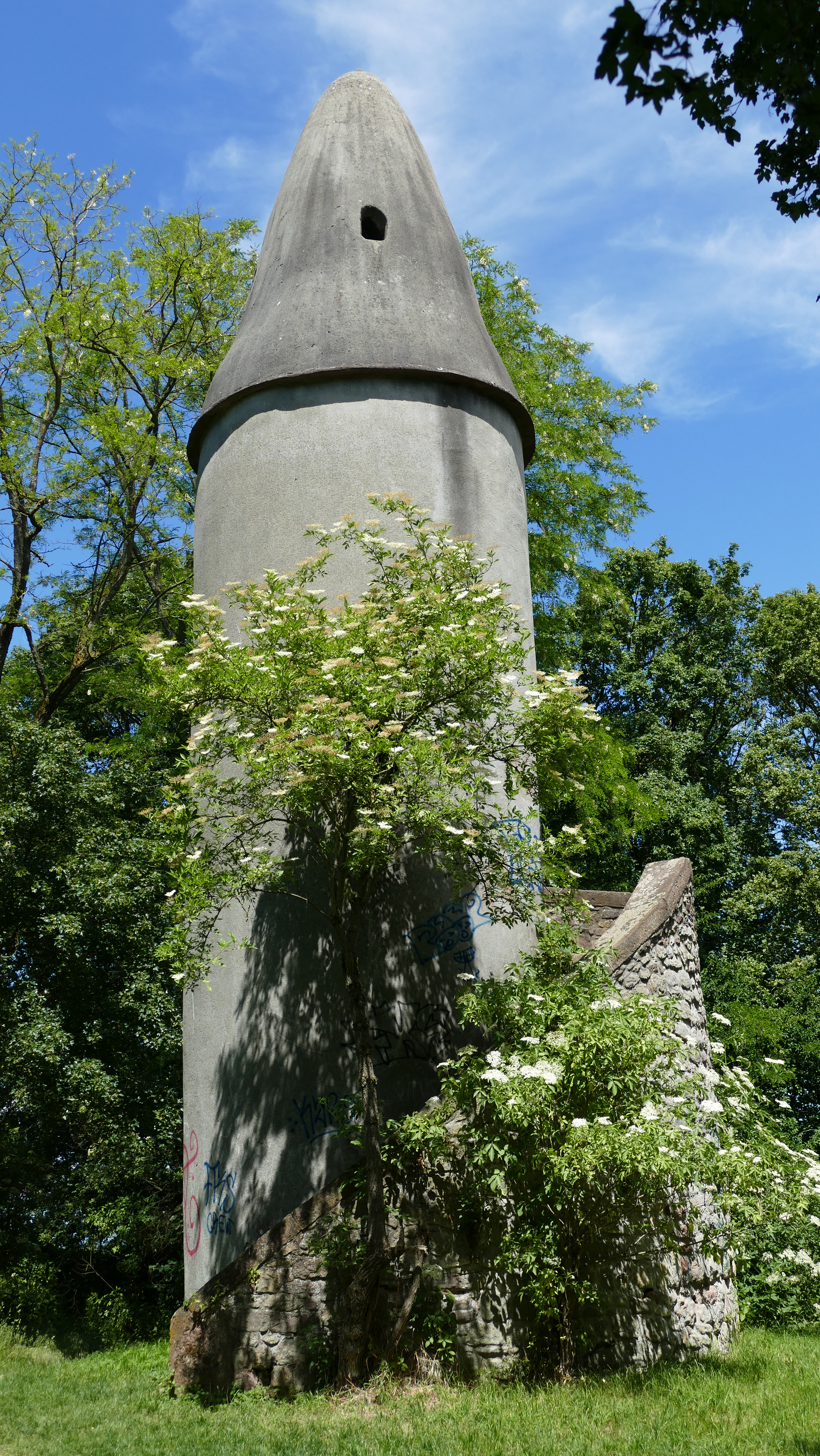 Der Turm ist die Berger Warte. Er steht mitten im Vogelschutzgehölz.